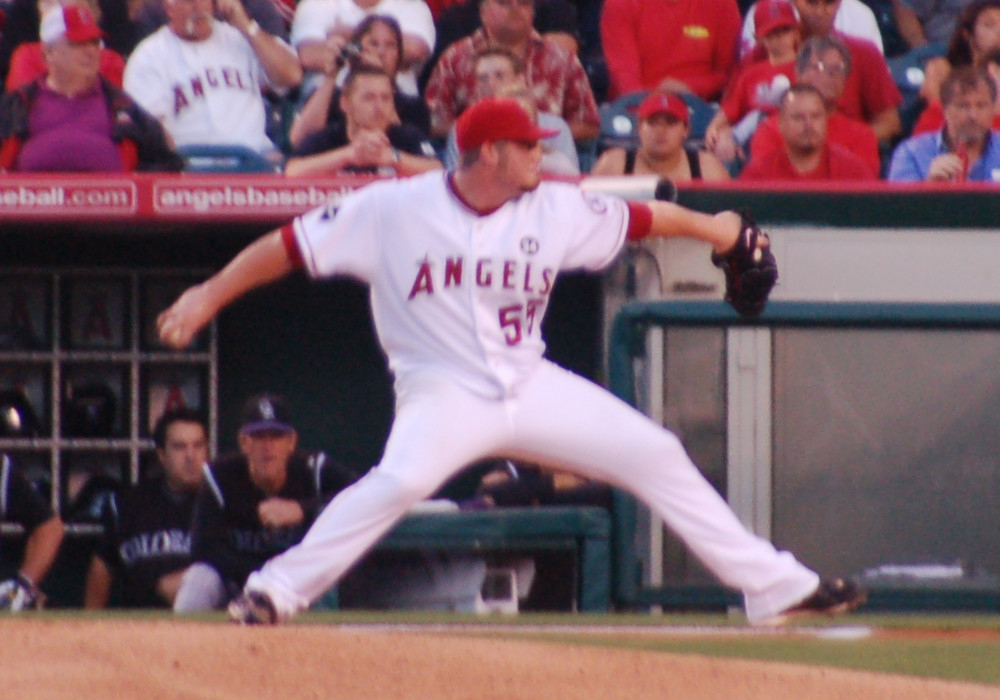 Sean O'Sullivan